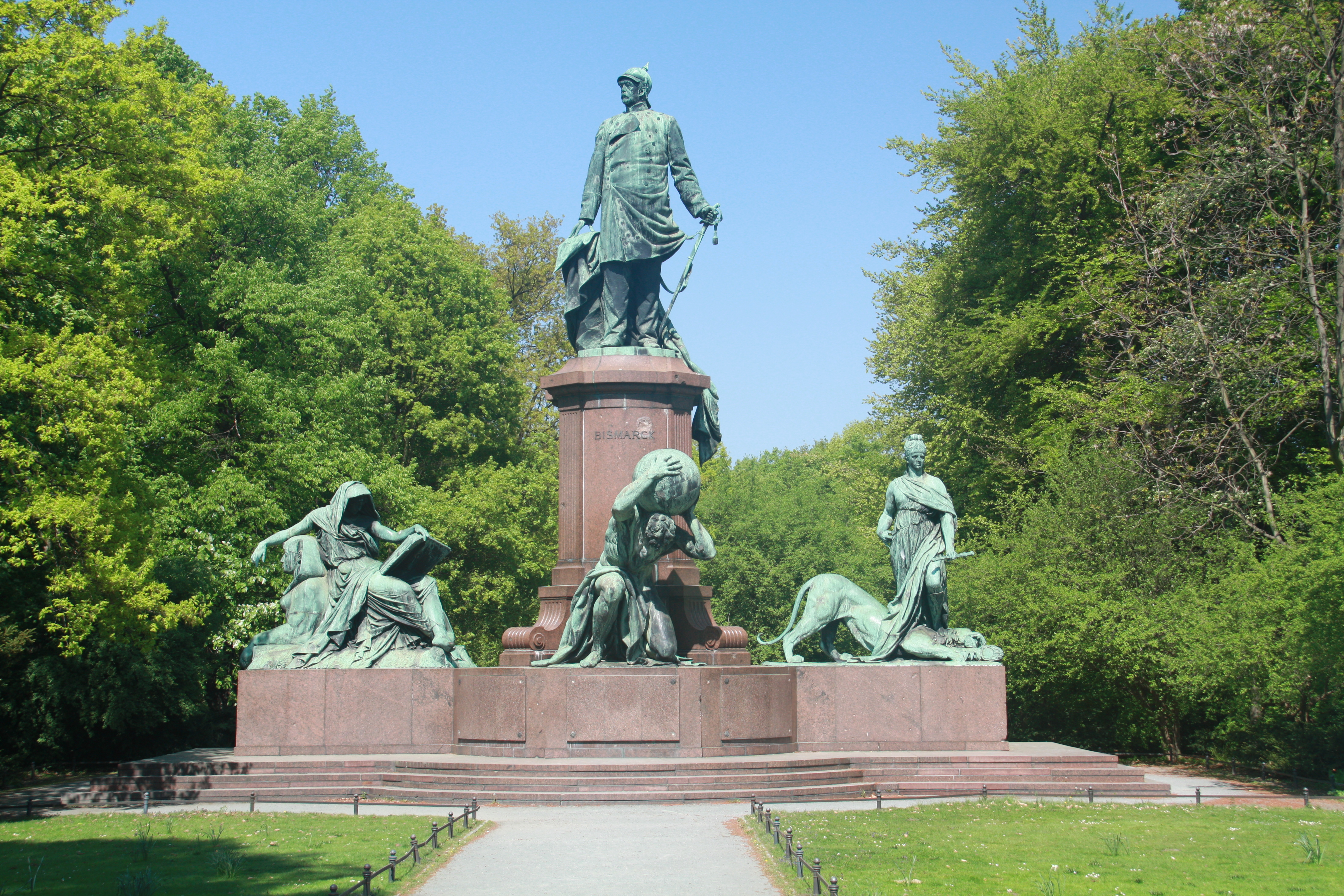 Bismarck-Nationaldenkmal April 2009